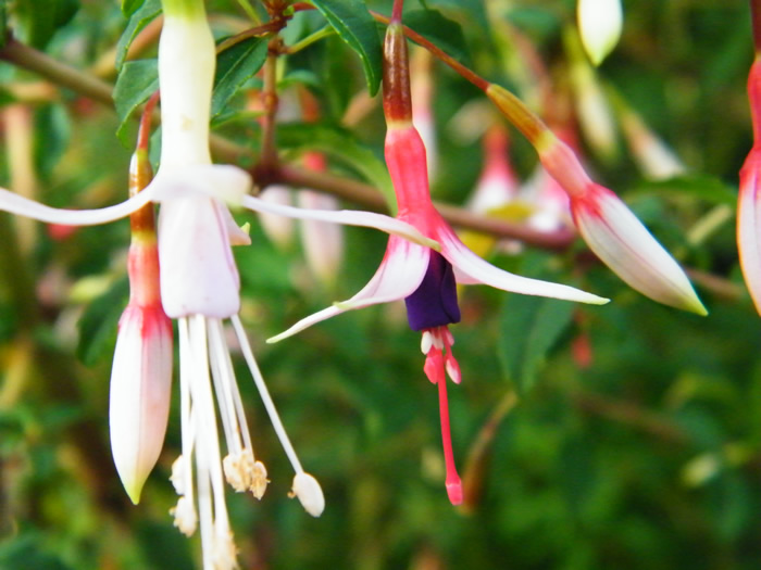 fuchsia magellanica var. alba y var. eburnea